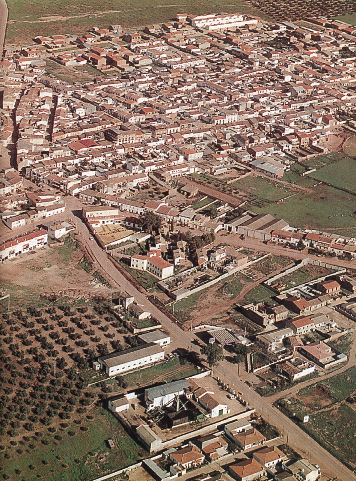 Vista panorámica de Arquillos, Jaén, España.